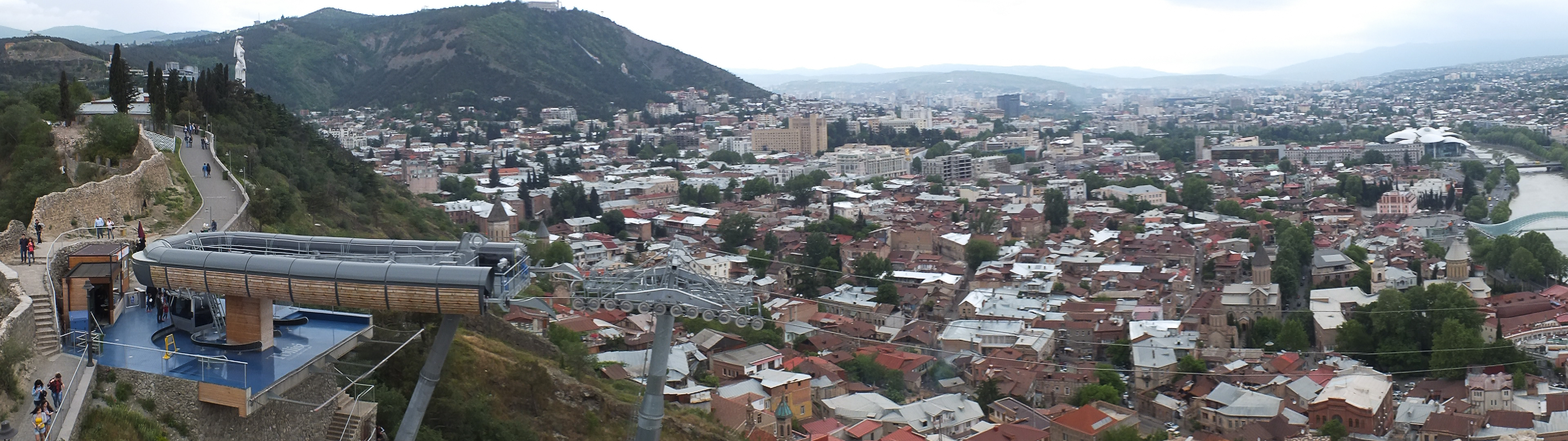 View from Narikala, Tbilisi